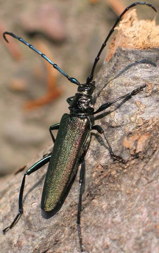 Moschusbockweibchen (Aromia moschata), Beim weiblichen Moschusbock sind die Fühler kürzer als der Körper. Beim männlichen Moschusbock sind sie länger als der Körper.